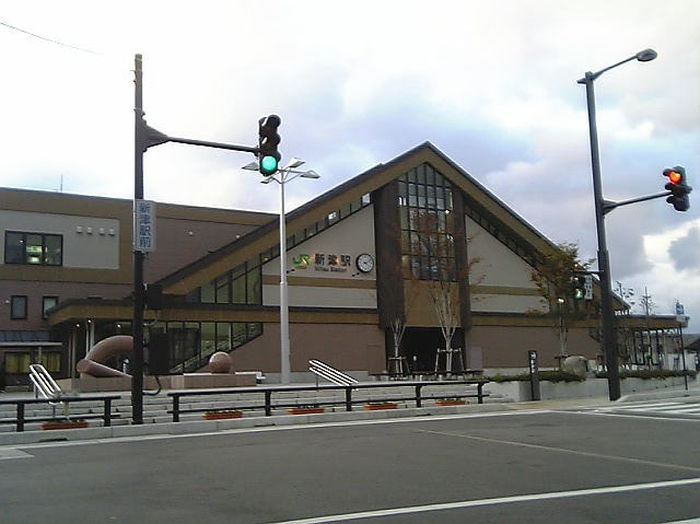 JR新津駅東口